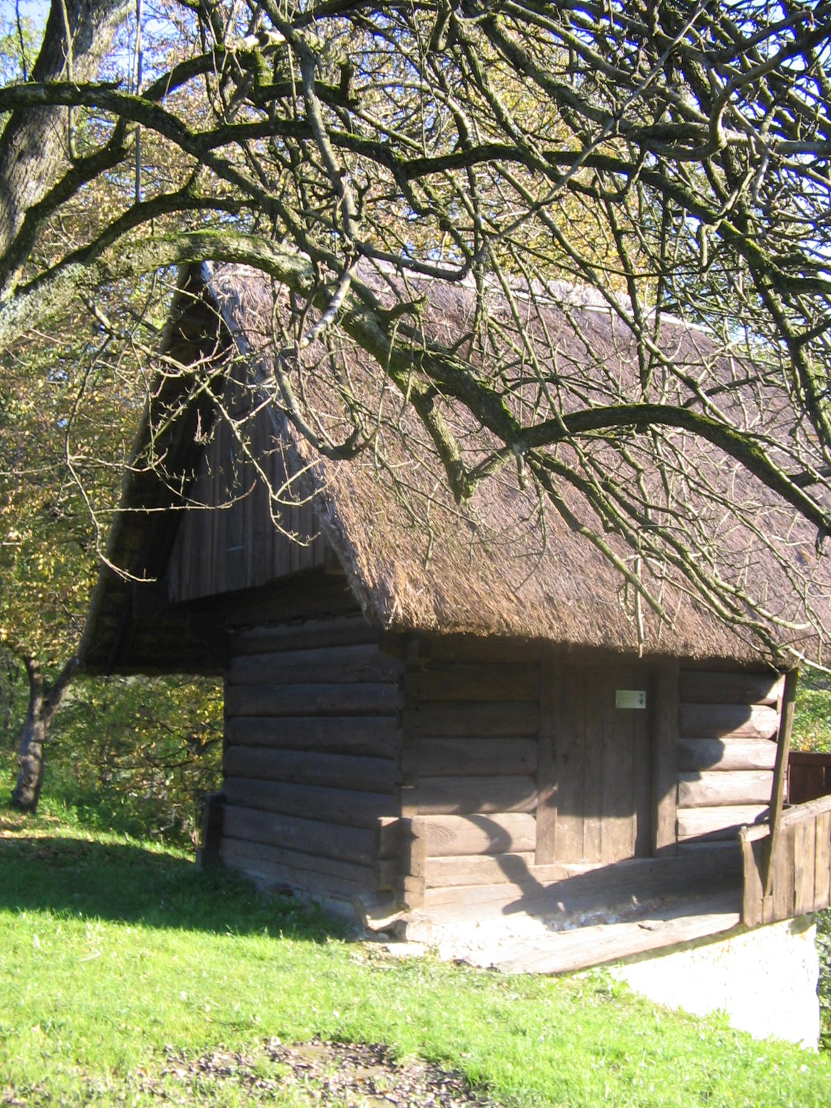 Open air museum Zaprice, granary, 1793 Quelle: eigene Aufnahme 18. 10. 2005 Fotograf: Janez Novak, Ljubljana, Slovenija ]